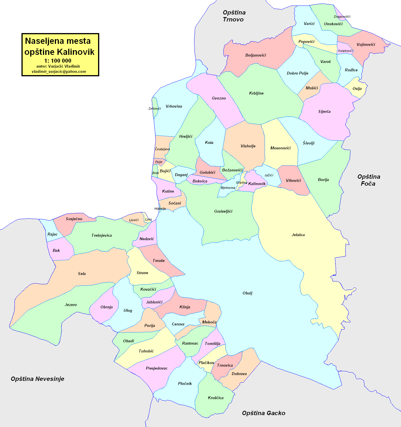 Opština Kalinovik